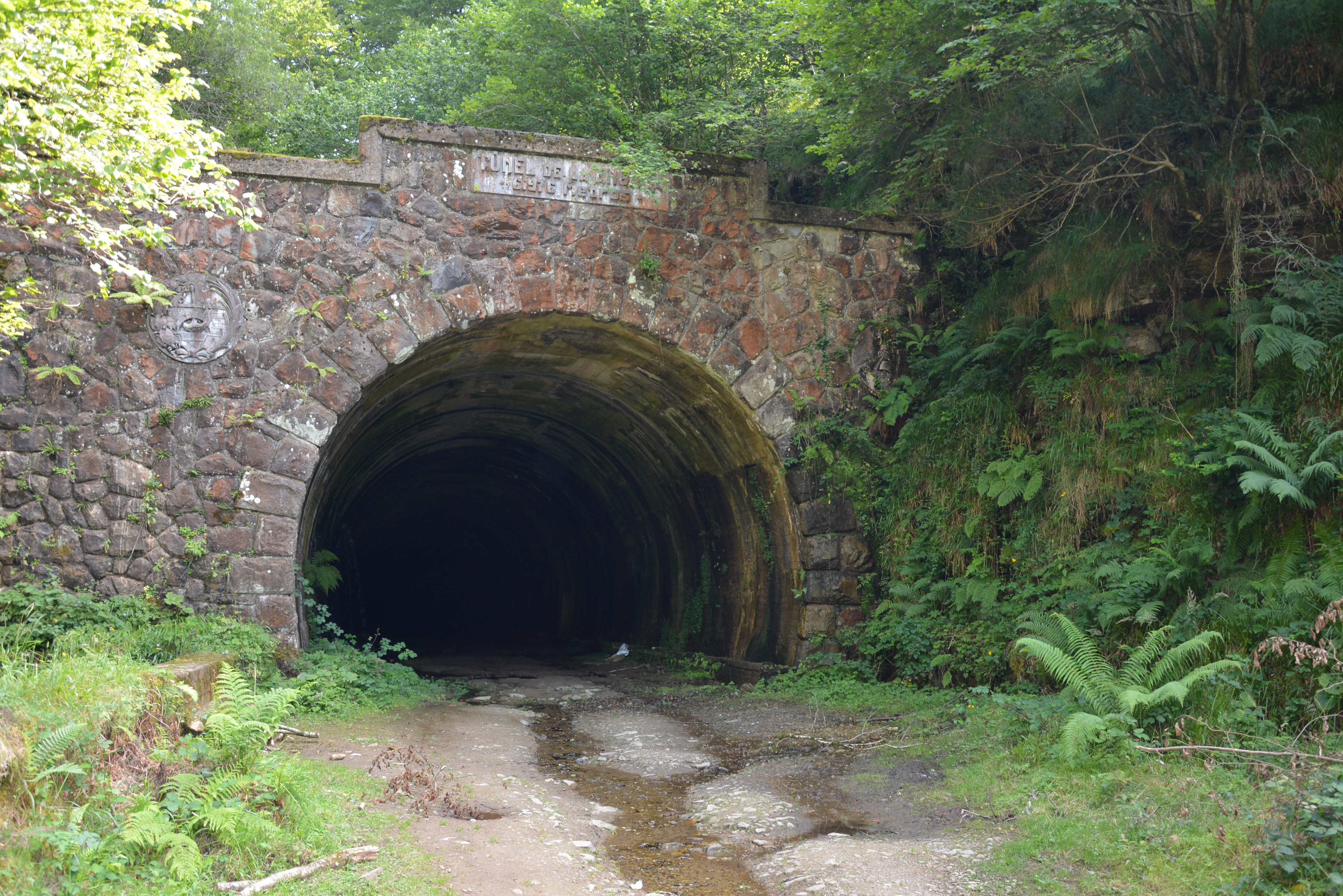 Boca norte del Túnel de la Engaña, entre Cantabria y Burgos (España)